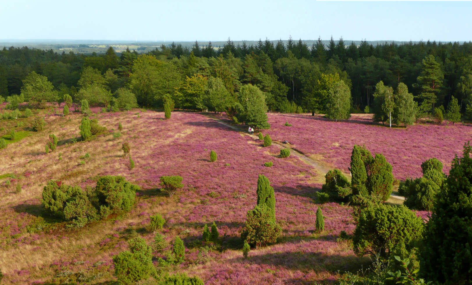 Heidelandschaft am Rande des Totengrunds